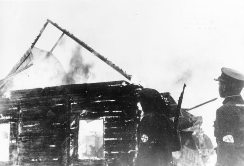 ADN-Bildarchiv II. Weltkrieg 1939 -1945 Nach dem Einmarsch der faschistischen deutschen Wehrmacht wurde in einem litauischen Ort die Synagoge angezündet. Aufnahme: Zoll/Juni 1941 6689-41